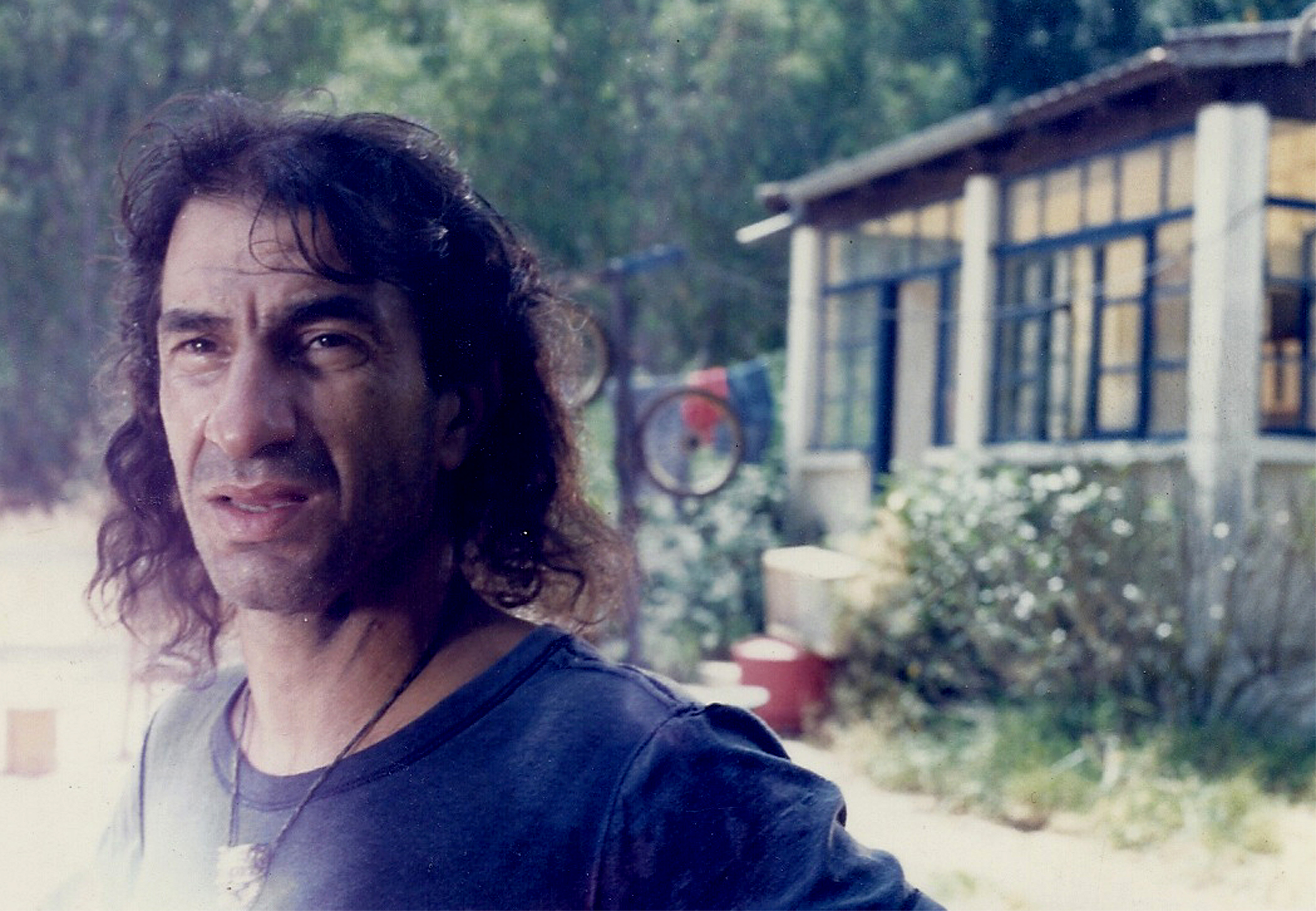 מתוך "סיפורים לשעת לילה מאוחרת" ששון גבאי בעת צילומי הבובה